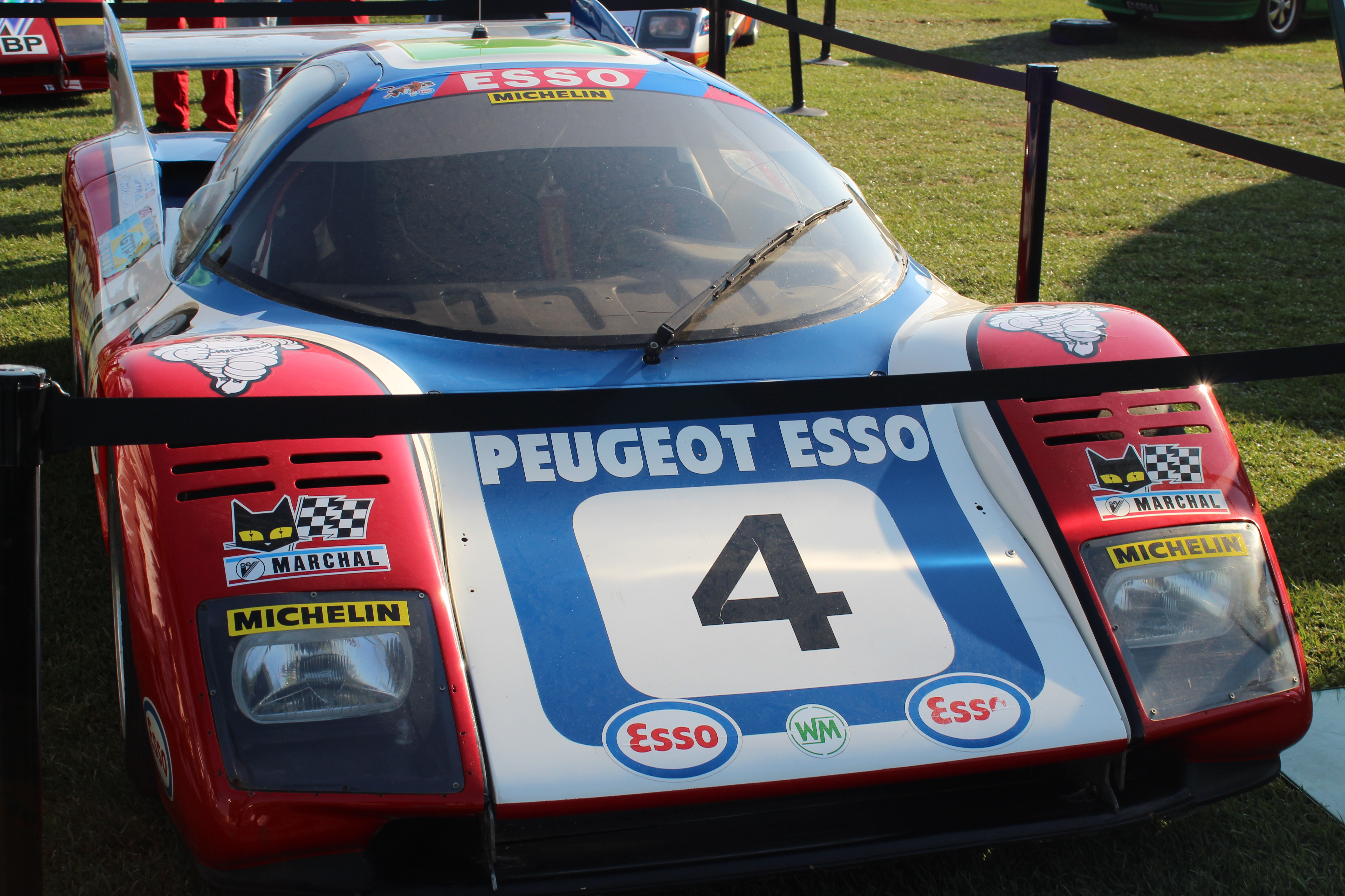 WM Peugeot P80 au Le Mans Classic 2018